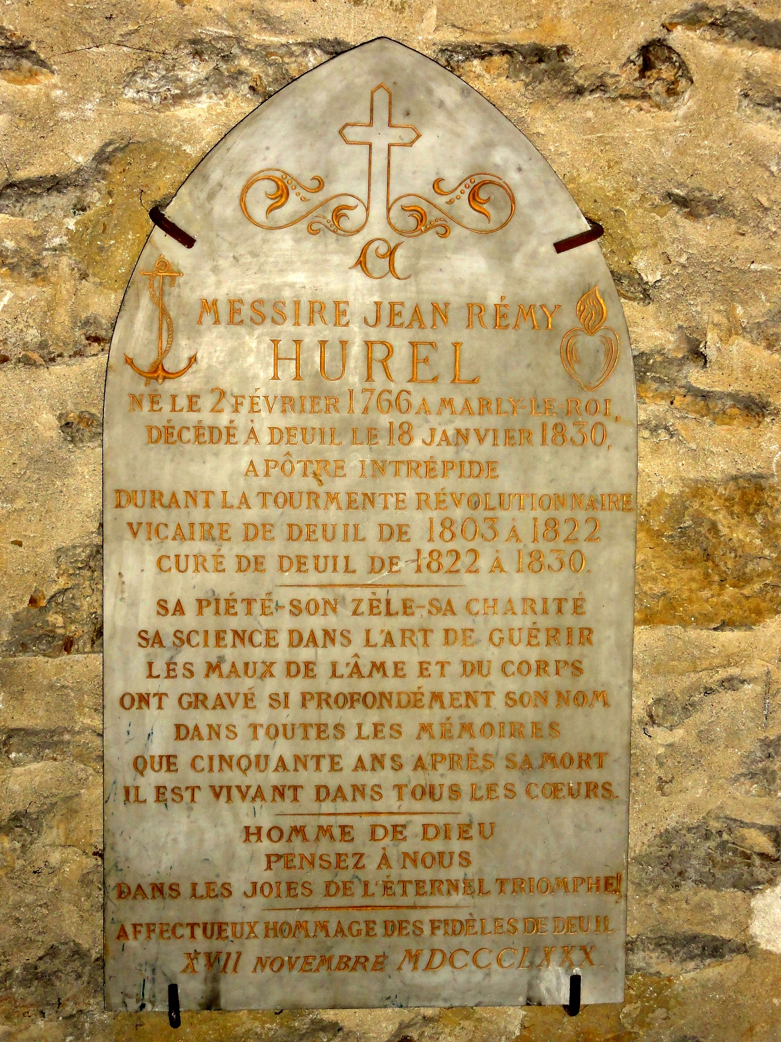 Plaque commémorative pour le curé Jean Rémy Hurel.